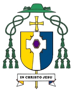 Wappen Zygmunt Józef Pawłowicz * 1927 WSihbischof in Danzig (1985-2005)